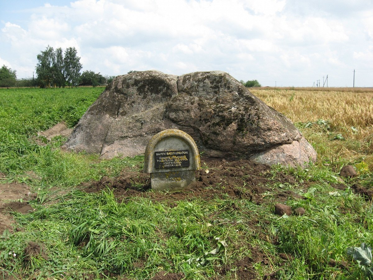 Васілішкі. Васілішкаўскі валун